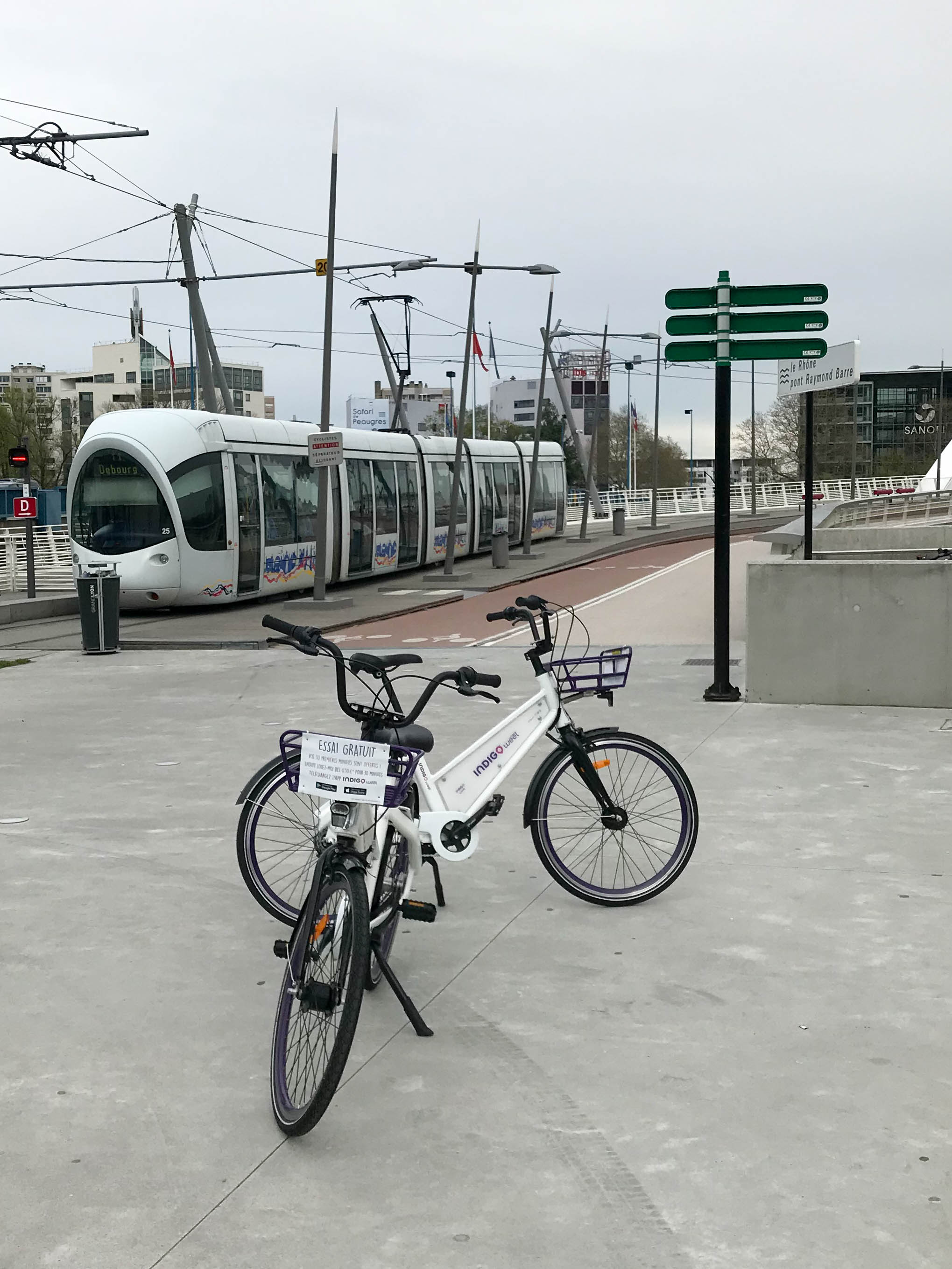 Deux vélo Indigo Weel sur le parvis du musée des Confluences à Lyon